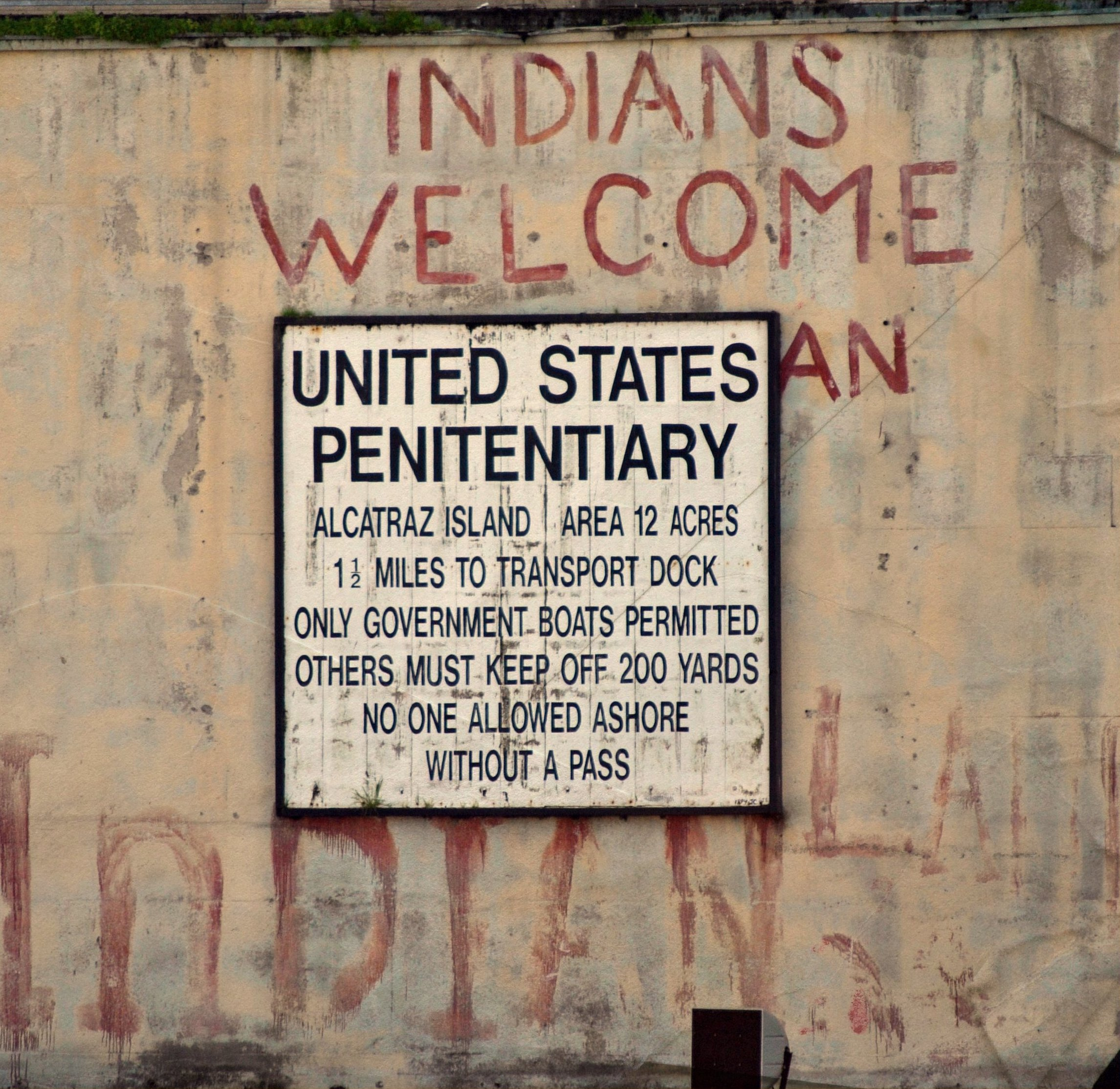 Alcatraz Island